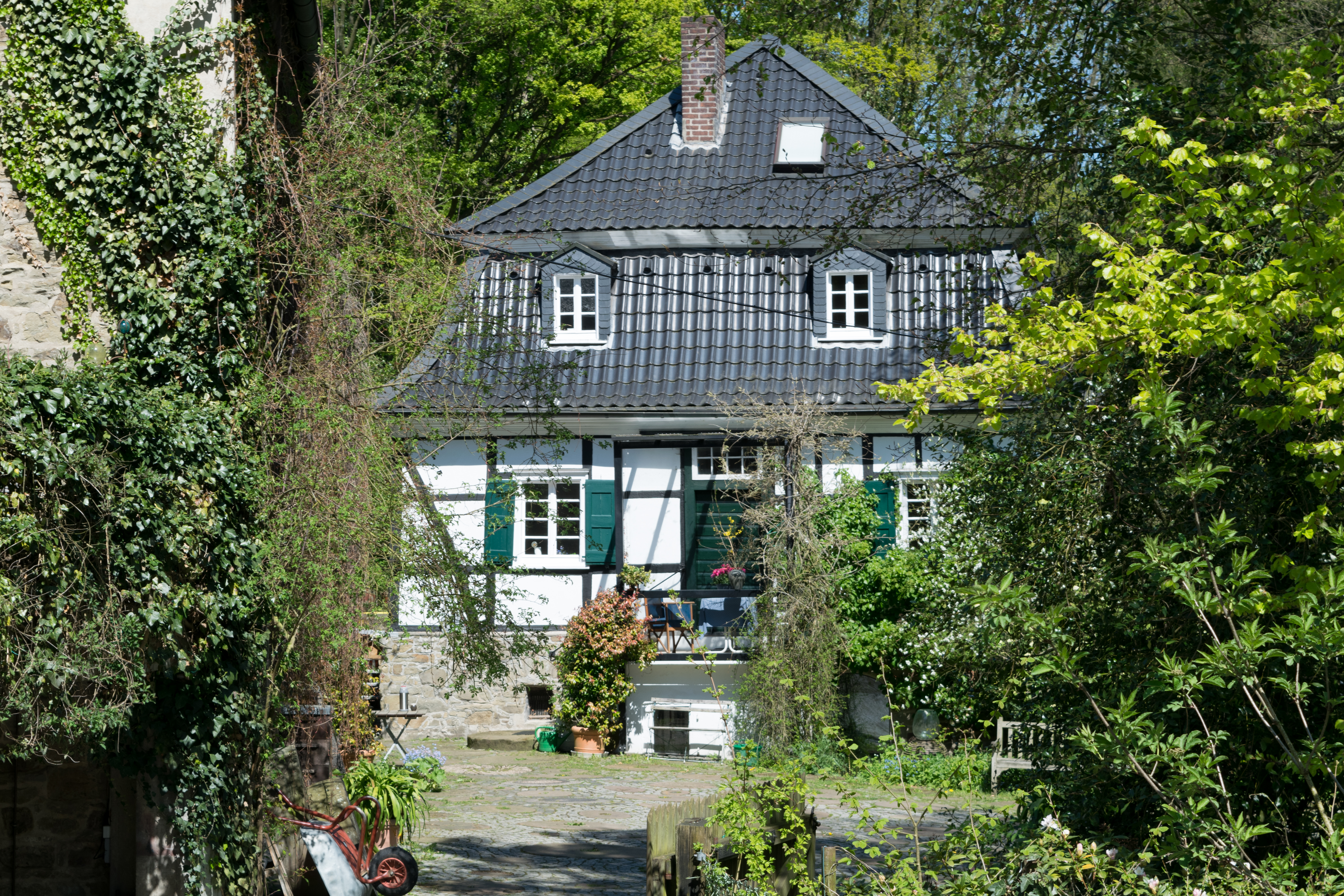 Kotzerter Straße, Solingen